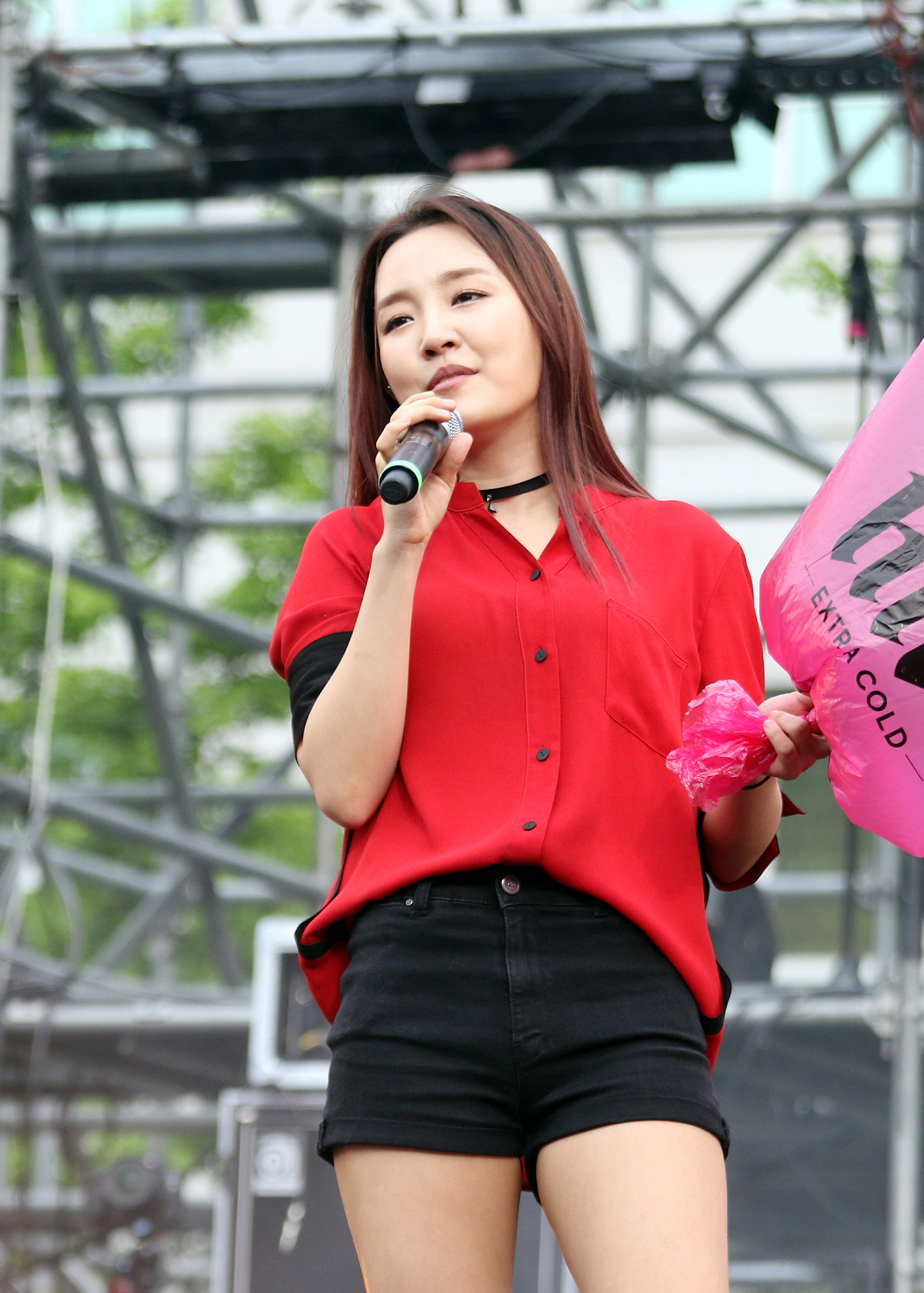 160527 입실렌티 윤하